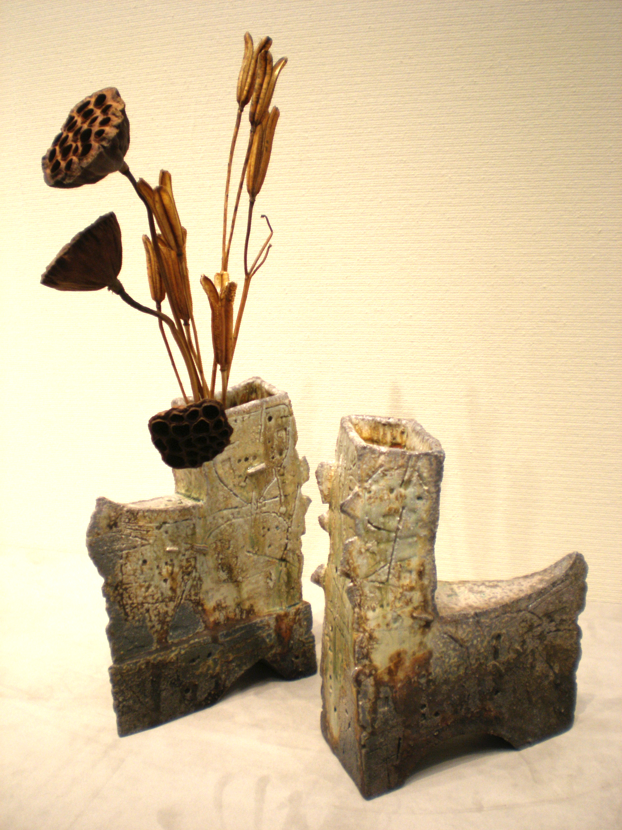 越前陶芸村で活動されている、陶芸家・山田和氏の作品。2011年9月10日、JR大阪三越伊勢丹・美術画廊での個展を撮影。